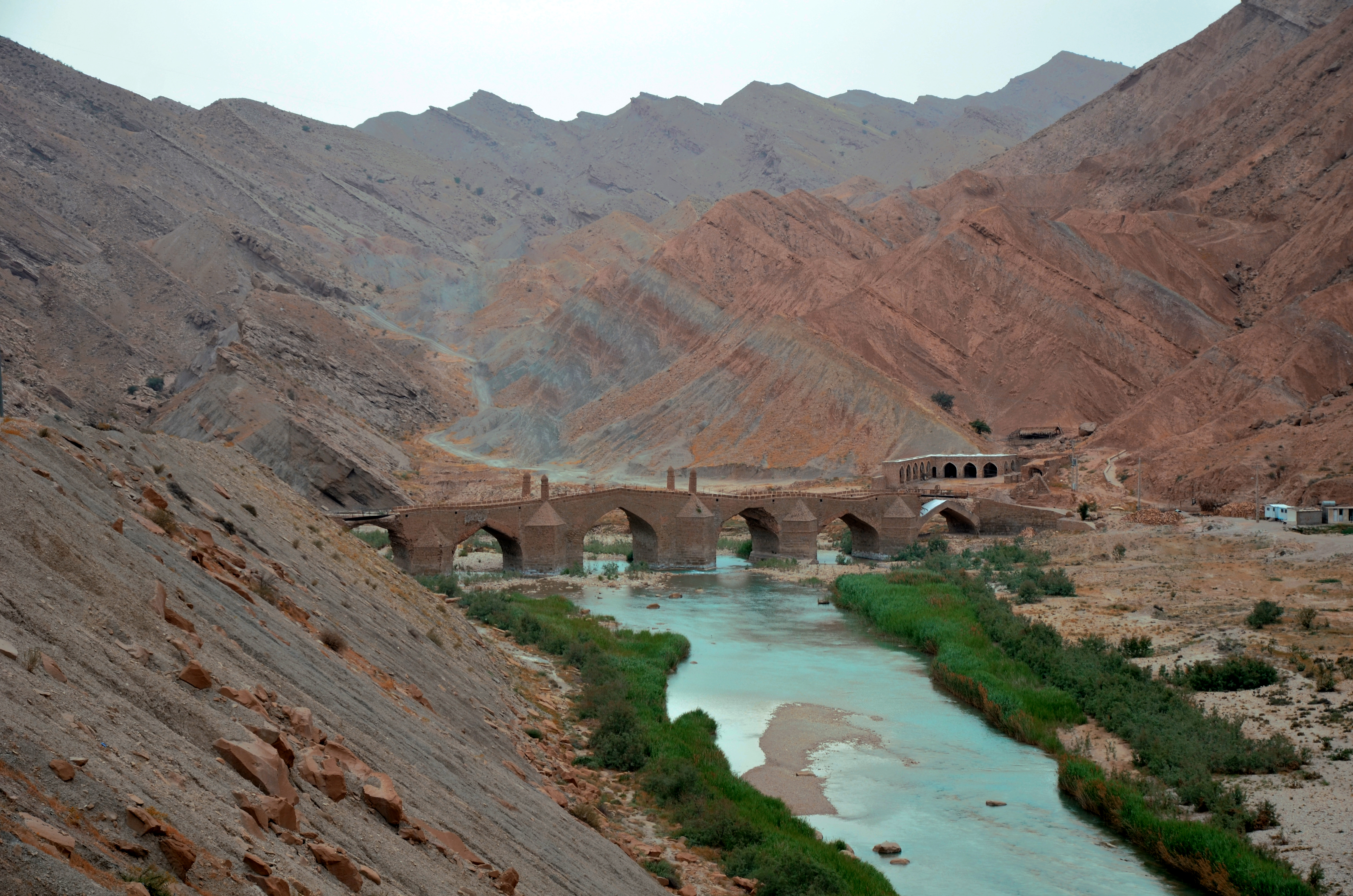 Dalaki - Moshir bridge